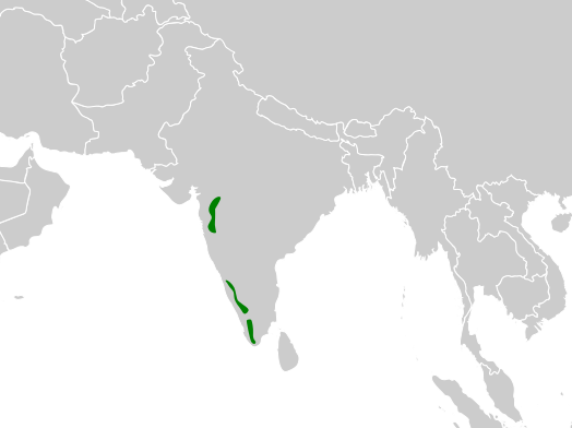 Schoenicola platyurus distribution map, based on